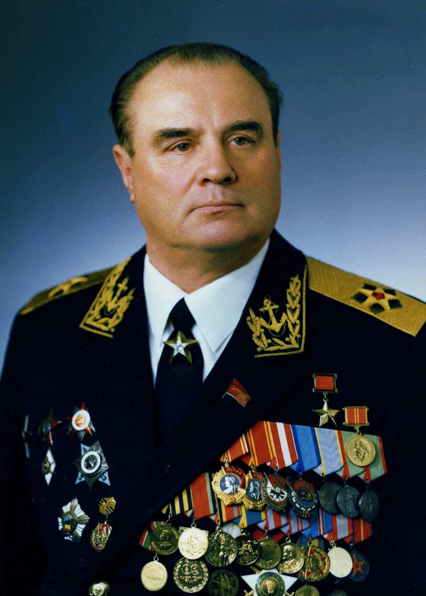 Адмирал Флота Смирнов Н.И.